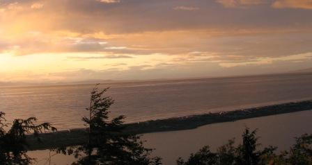 Dungeness Spit at Dusk, June 2007